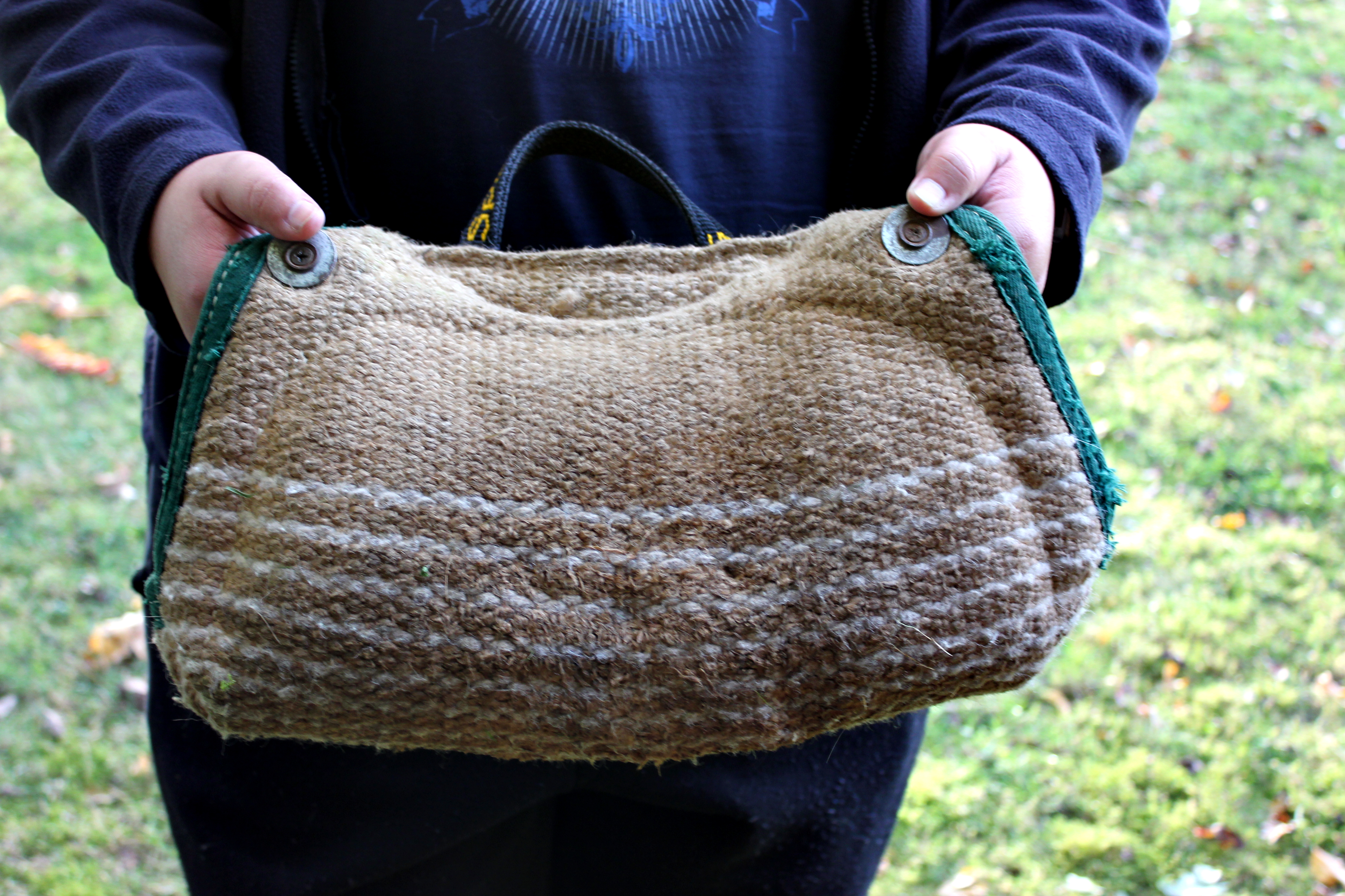 Hetzkissen wie es im Schutzhundesport genutzt wird.